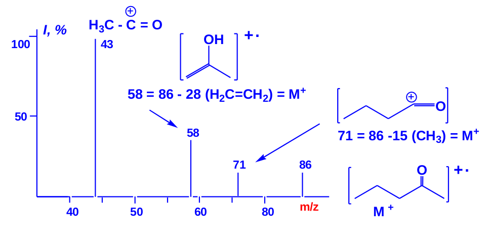 Բեկորացման սխեմա